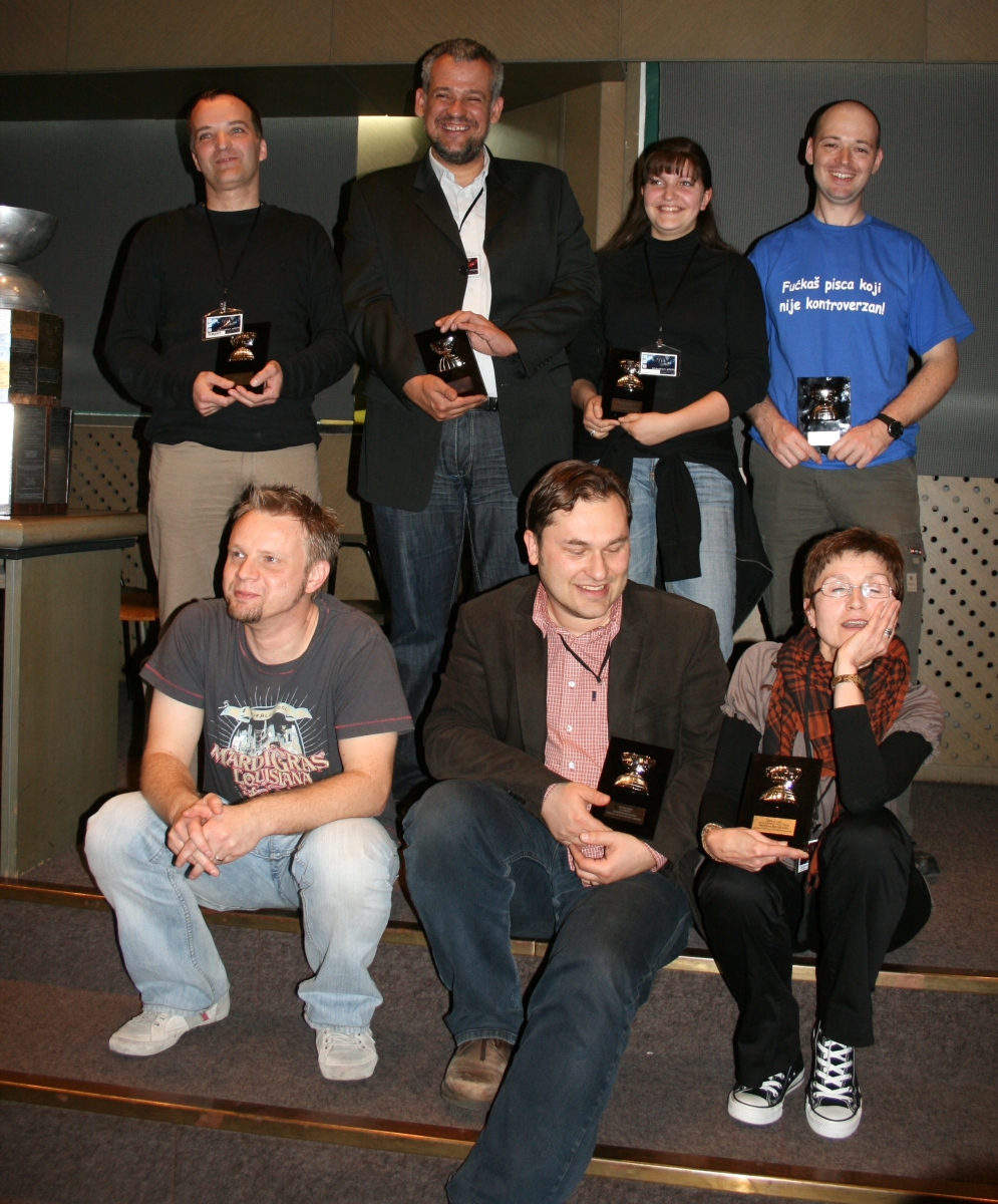 SFeraKon, Zagreb